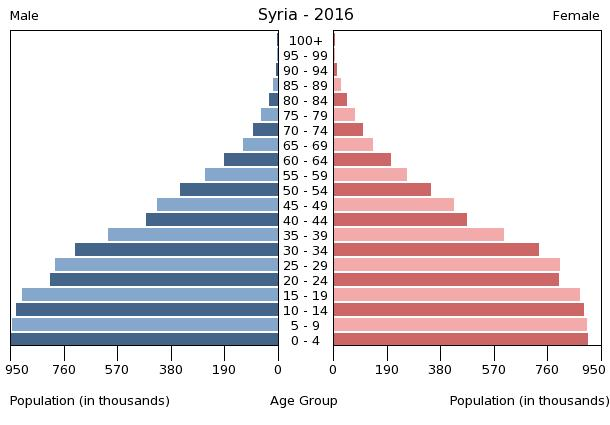 A population pyramid illustrates the age and sex structure of a country's population and may provide insights about political and social stability, as well as economic development. The population is distributed along the horizontal axis, with males shown on the left and females on the right. The male and female populations are broken down into 5-year age groups represented as horizontal bars along the vertical axis, with the youngest age groups at the bottom and the oldest at the top. The shape of the population pyramid gradually evolves over time based on fertility, mortality, and international migration trends.